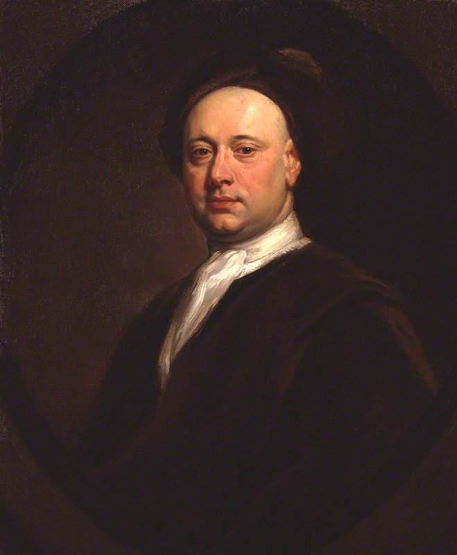 Portrait of George Vertue